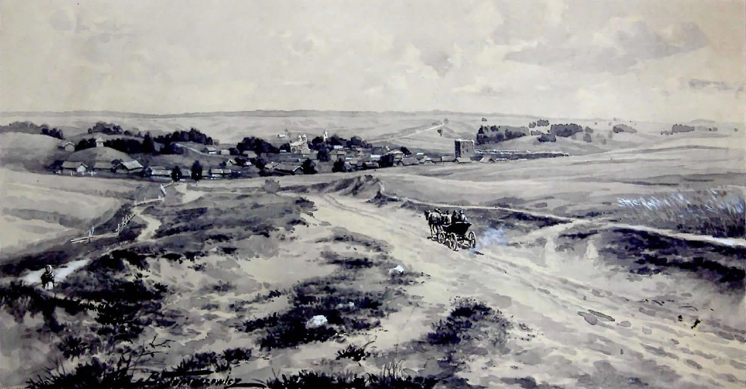 Беларуская (тарашкевіца): Крэва (Kreva)